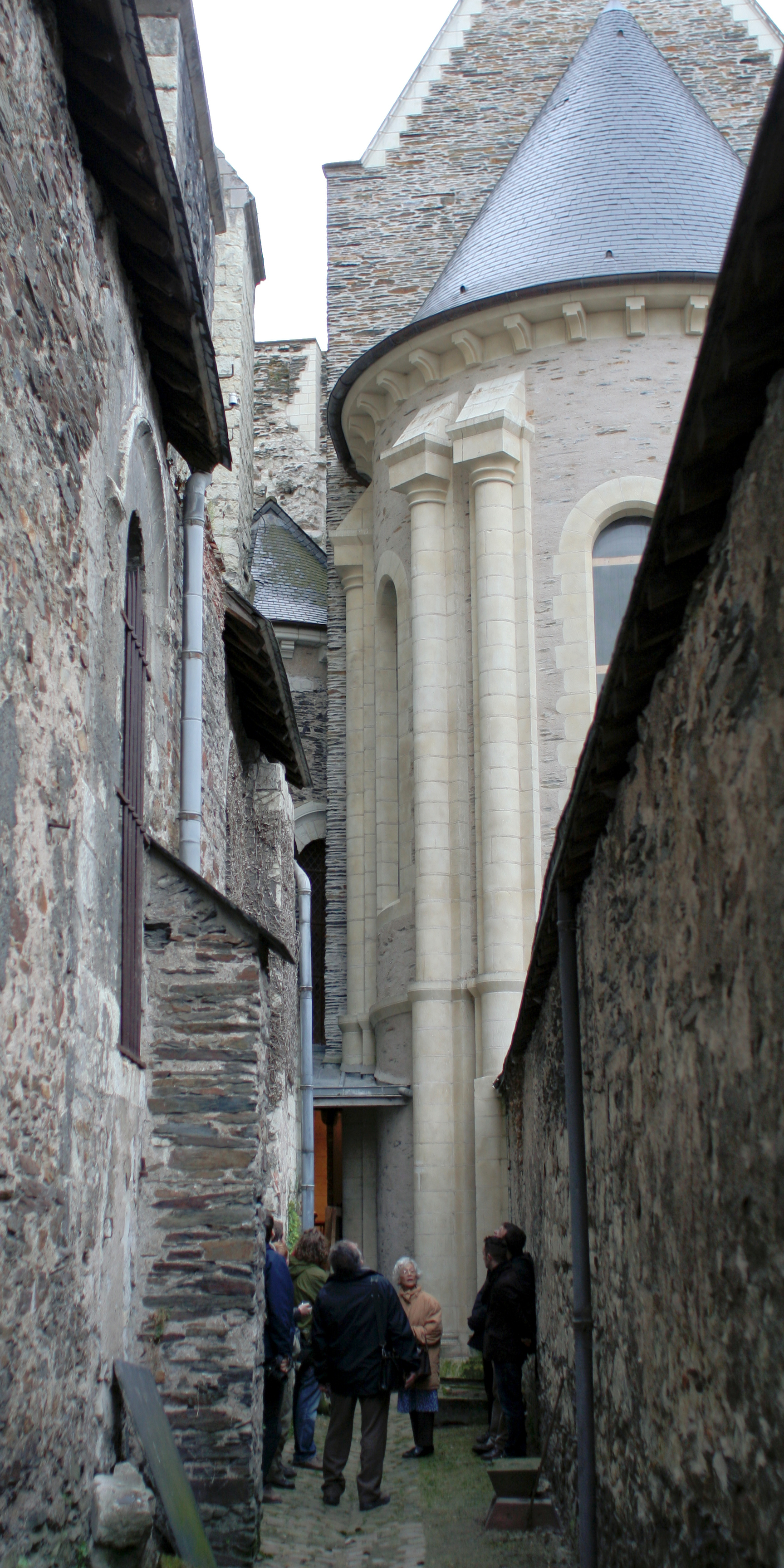 Venelle entre de l'église de la Trinité et l'abbaye du Ronceray à Angers. Maçonnerie schiste, colonnes, entourage des fenêtres et corniche en tuffeau.